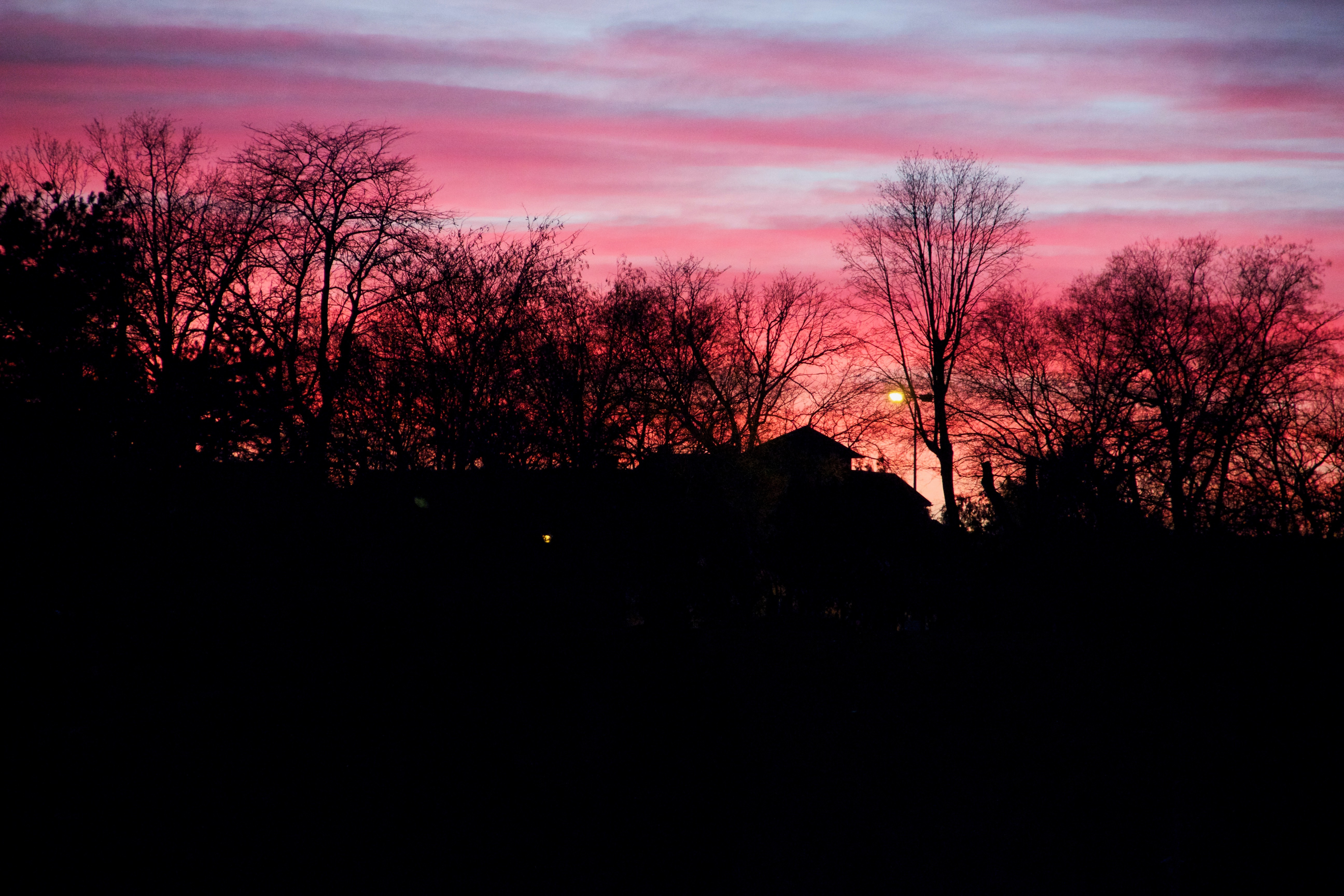 Zalazak sunca i pogled na Kalvariju